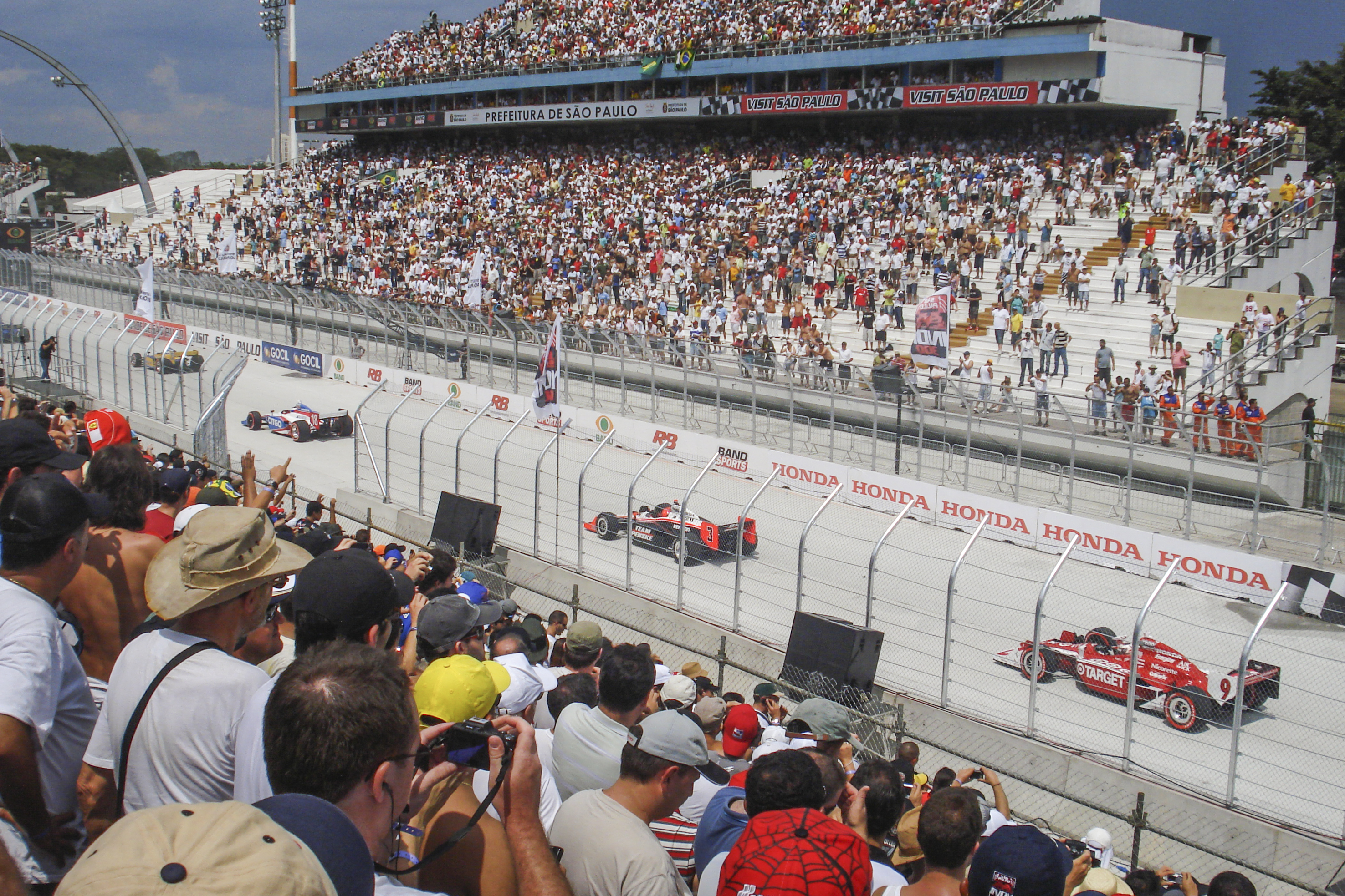 Vista da etapa de 2010 da São Paulo Indy 300, realizada no Sambódromo do Anhembi e Marginal Tietê